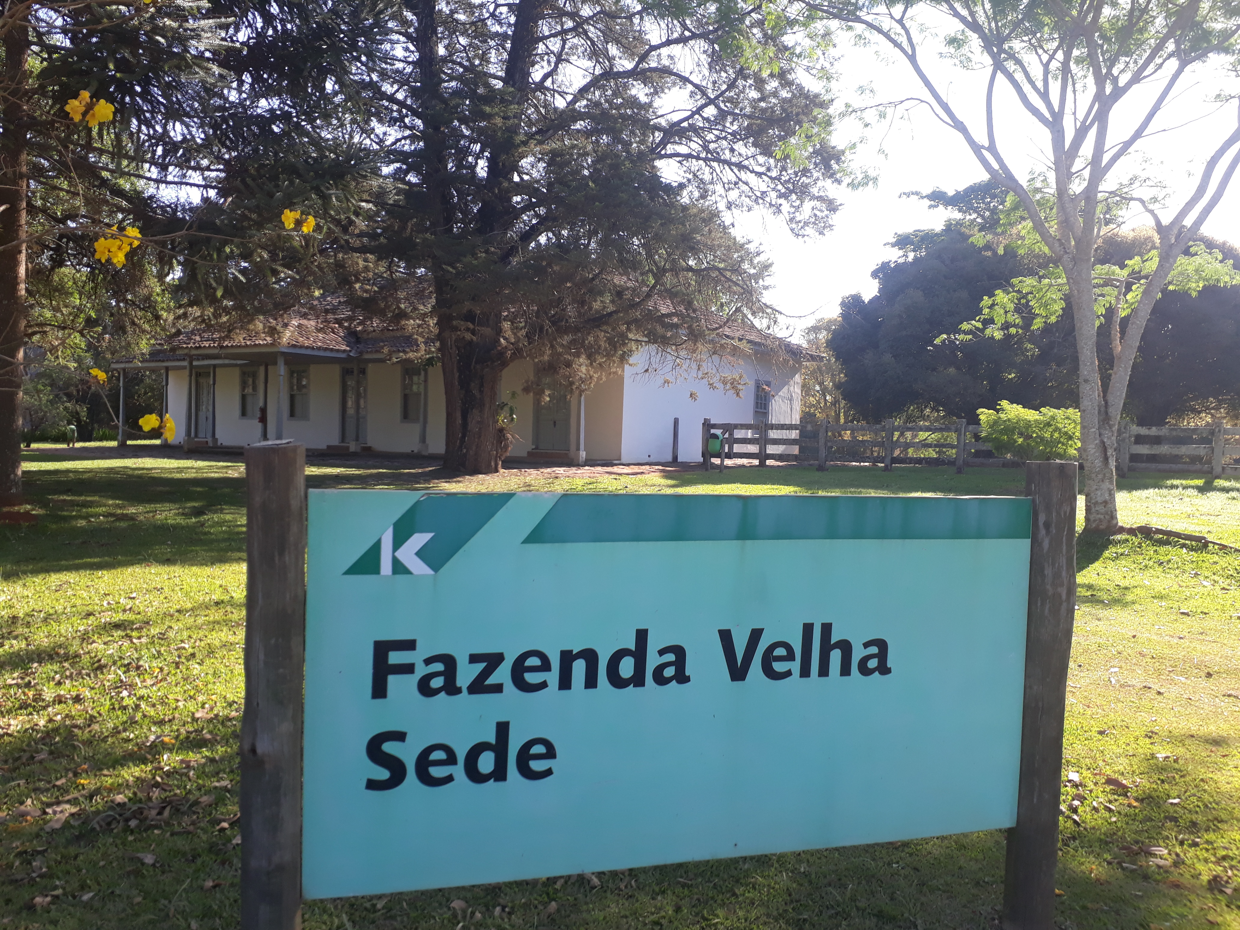 Placa da sede da Fazenda Velha. espaço preservado no município de Telêmaco Borba, no Paraná.